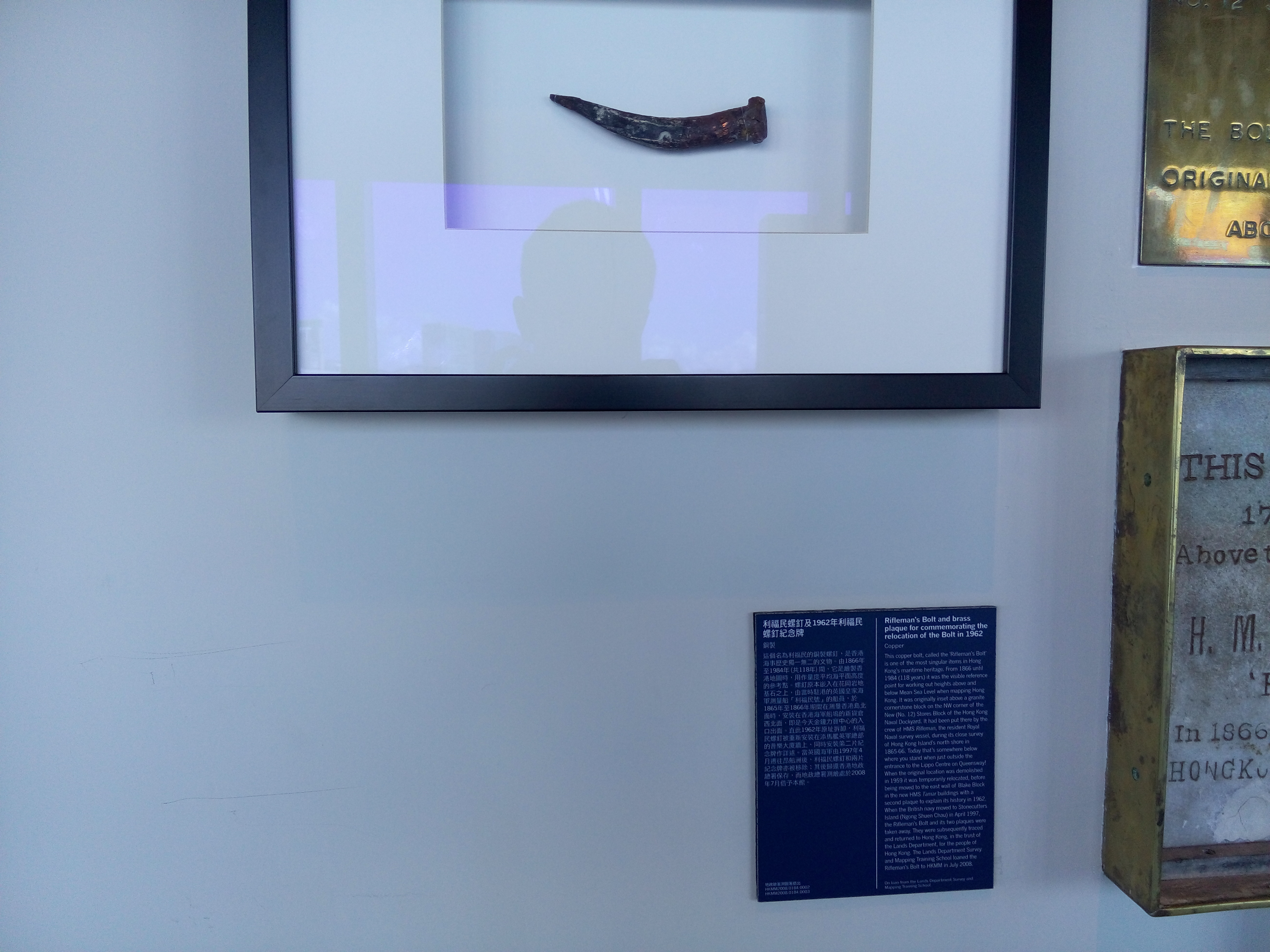 at Hong Kong Maritime Museum